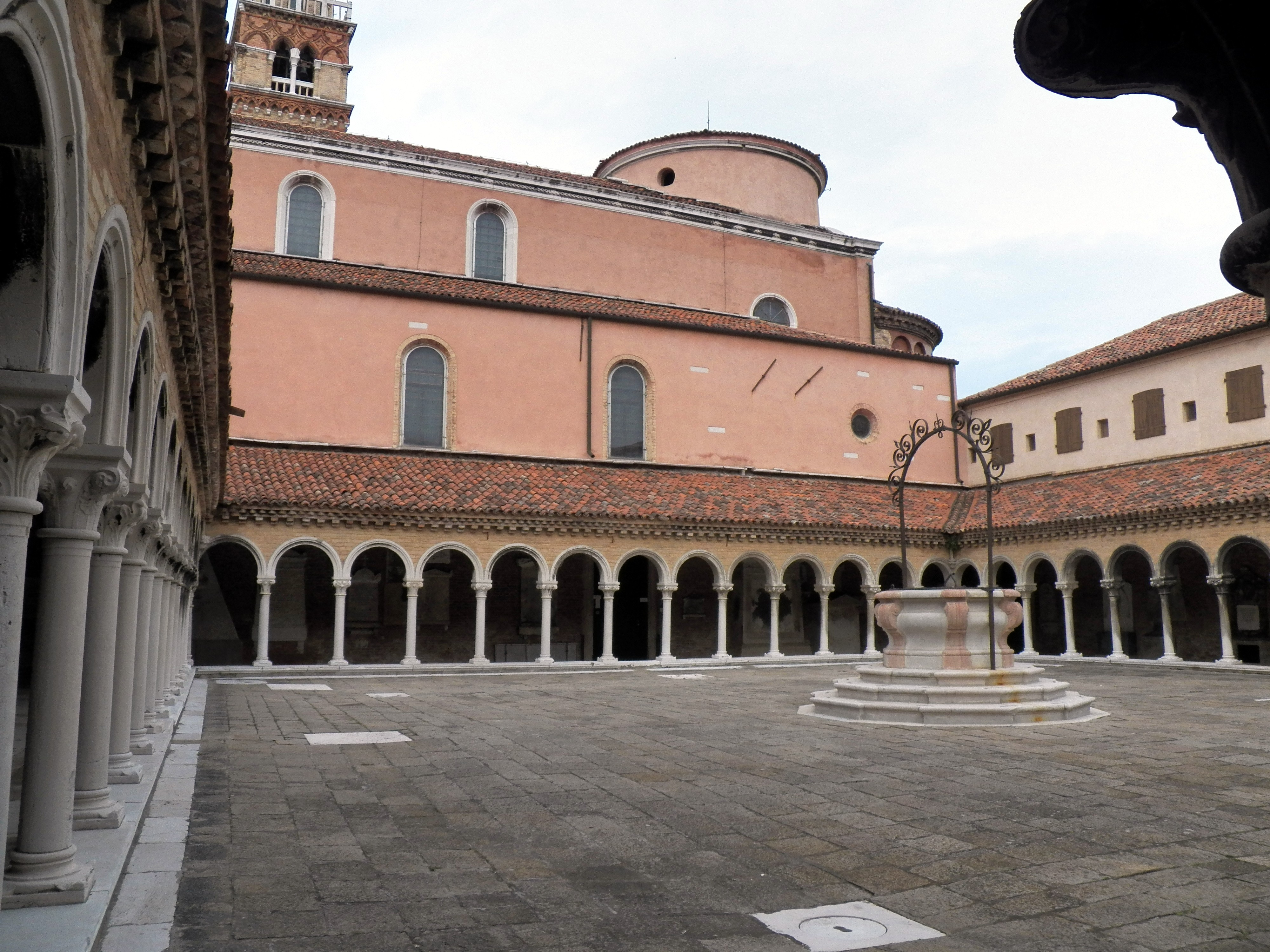 Premier cloitre et Pozzo — San Michele, Isola